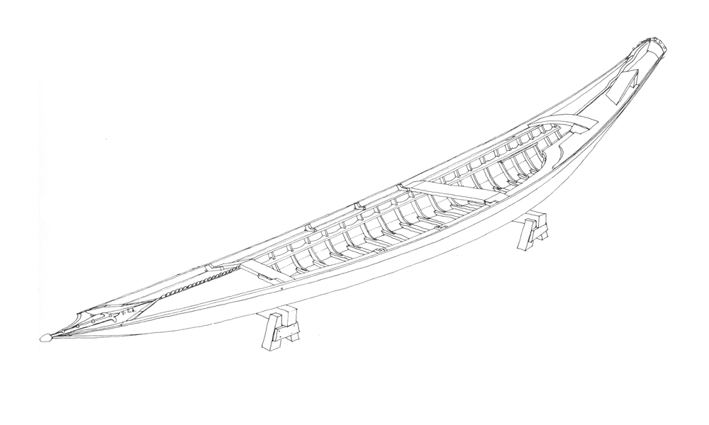 schema di un puppairno